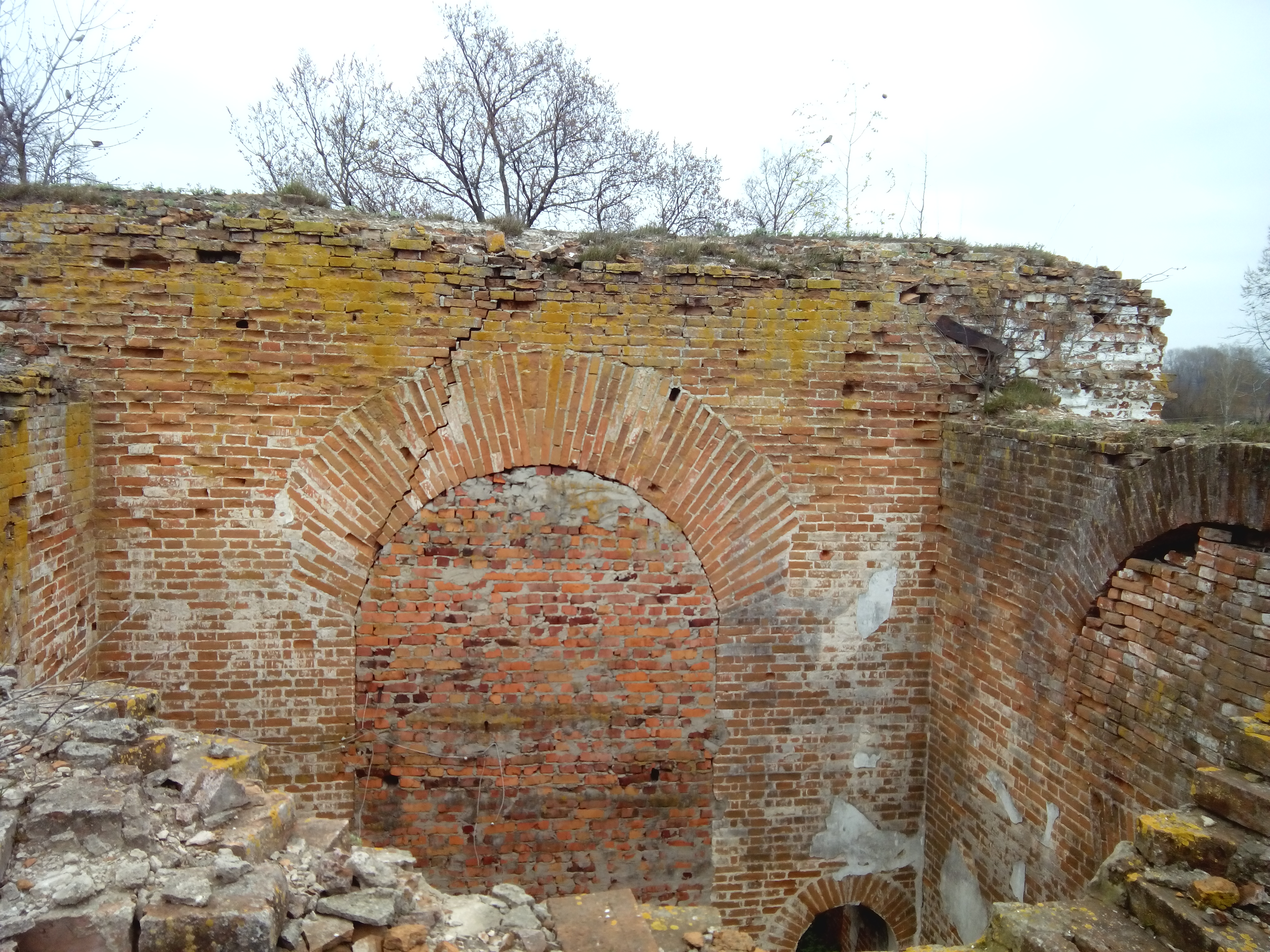 Городище, с.Івангород